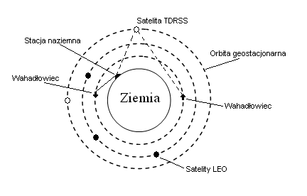 Łącznośc pomiędzy stacją naziemna a wahadłowcem